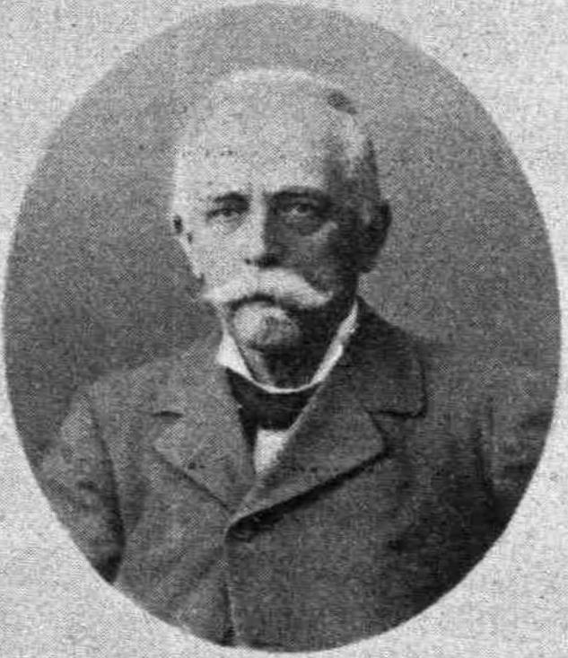 griechischer Schriftsteller, 19. Jahrhundert